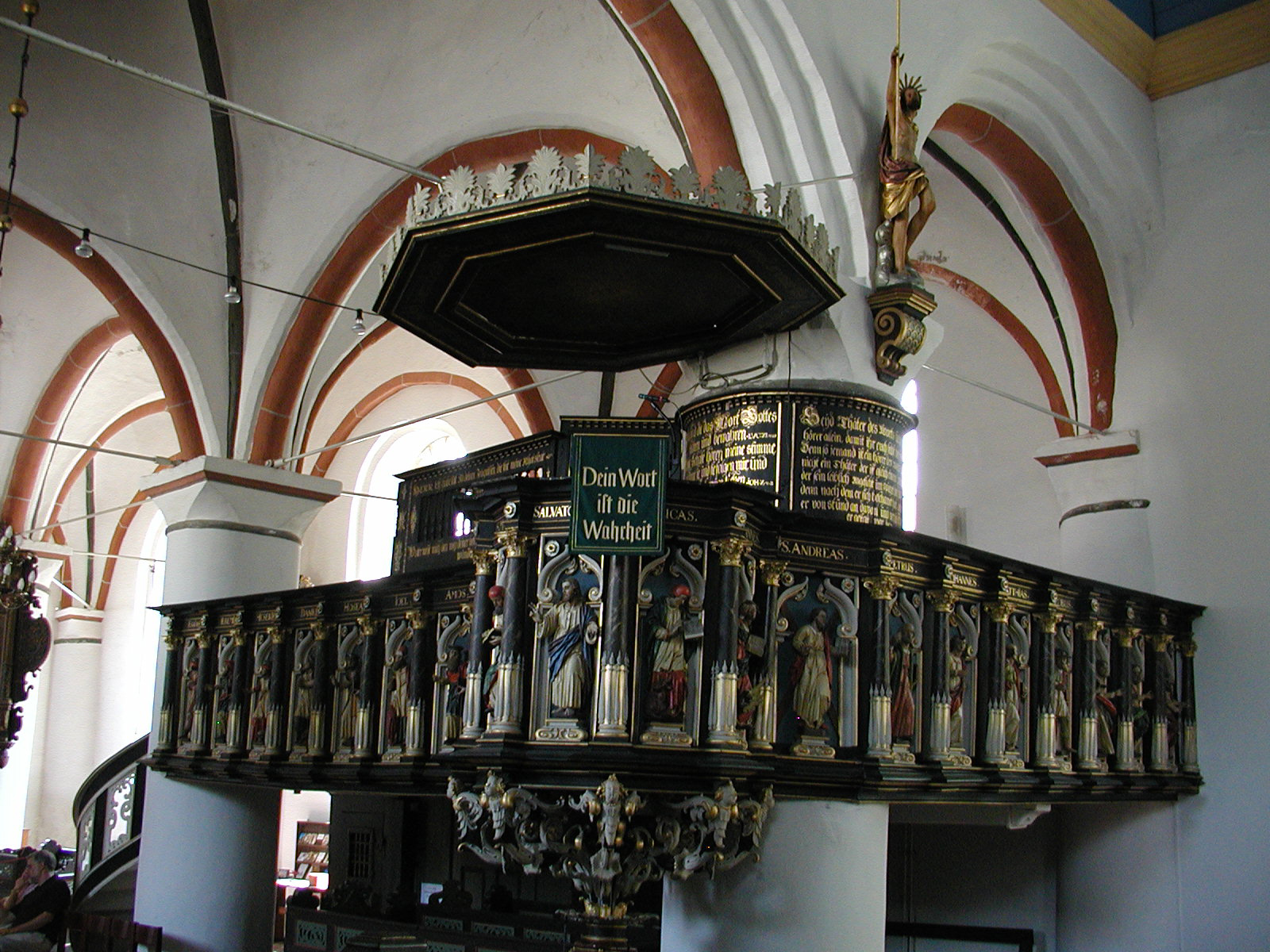 Die Kanzel als Mittelpunkt